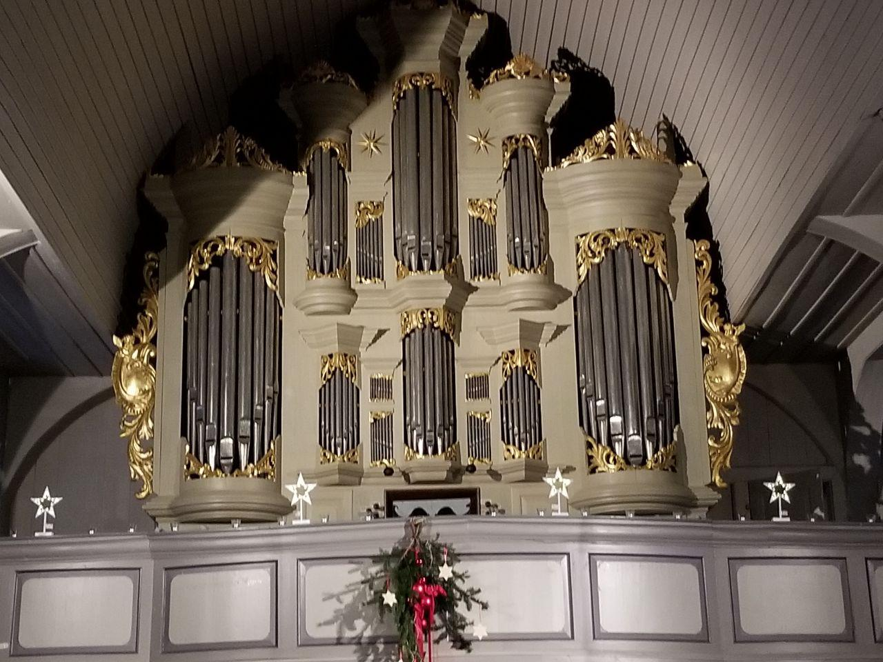 Feldsteinkirche Trebel. Vorderansicht der Georg-Stein-Orgel